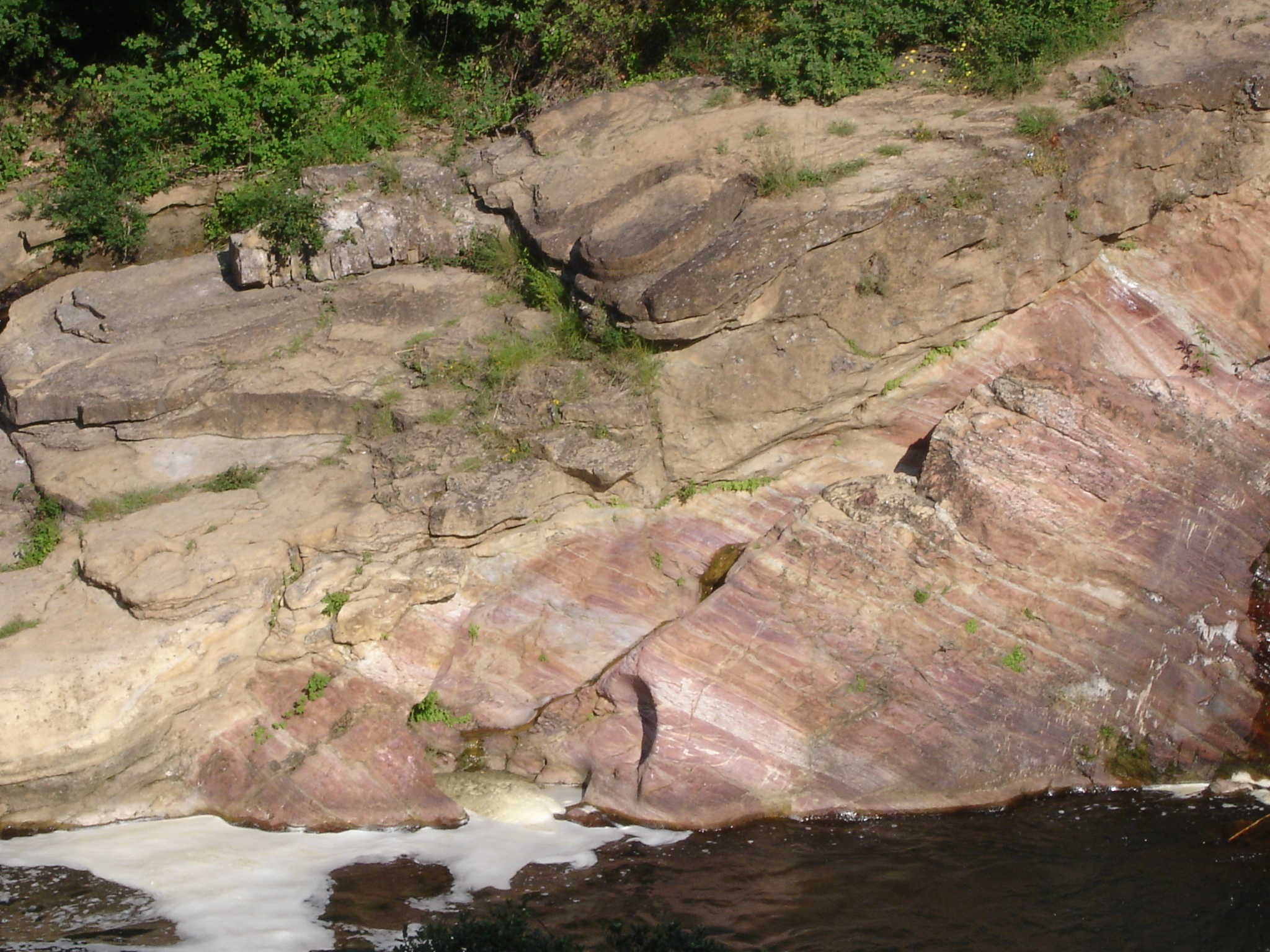 Discordance de Bédarieux, france, Hérault (34) - discordance Cambrien/Trias